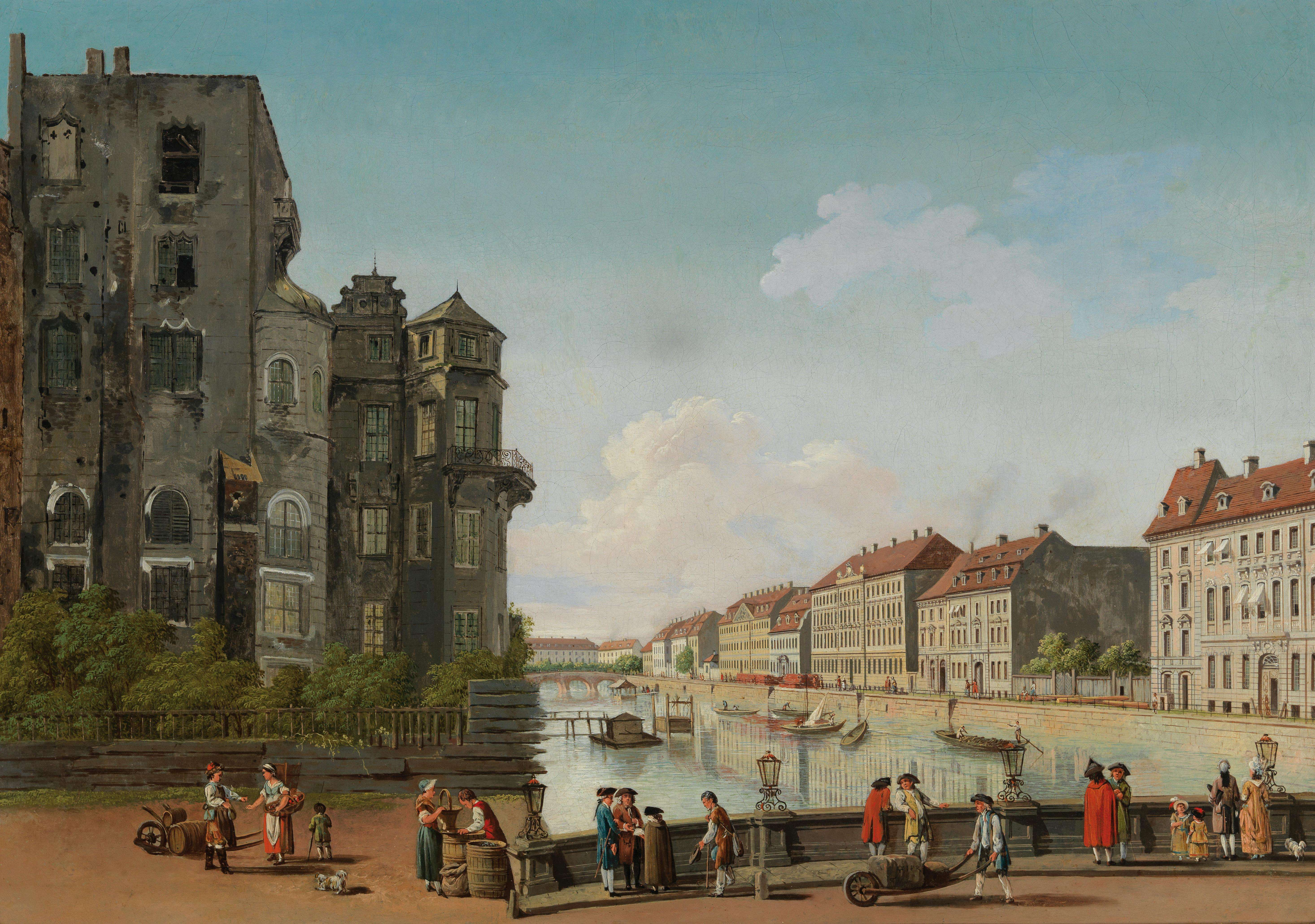 Der südliche Teil des Spreeflügels des Berliner Schlosses mit der Erasmuskapelle und dem Haus der Herzogin, vorn die Lange oder Kurfürstenbrücke (heute Rathausbrücke); und Der Berliner Dom (in der von J. Boumann d. J. und G. W. v. Knobelsdorff geschaffenen Form 1747–50), signiert und datiert unten rechts (auf der Schubkarre): Fechhelm/1768